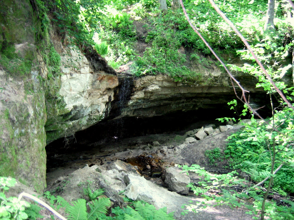 Turje kelder